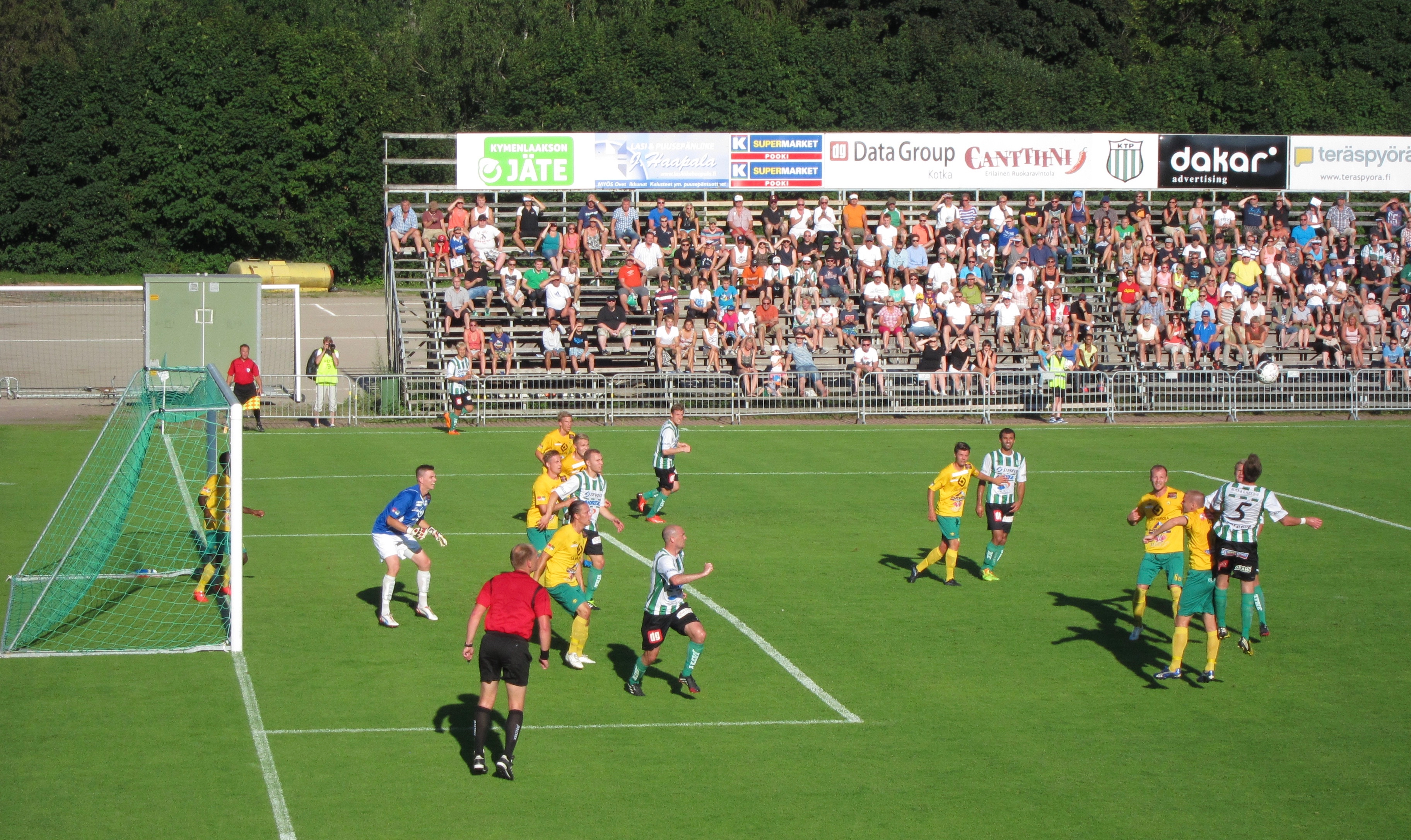 Ottelu KTP-Ilves Ykkösessä 20. heinäkuuta 2014 Kotkassa Arto Tolsa Areenalla.